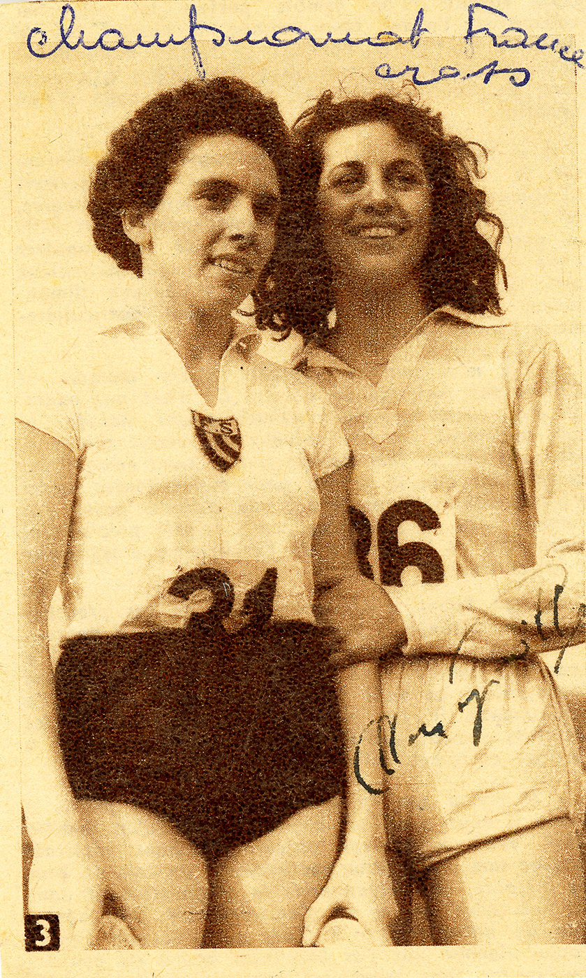 Les deux premières du championnat de France de cross 1954, Simone Cathiard (dossard 31) Femina Sport et Odile Monguillon (dossard 36) Racing Club de France